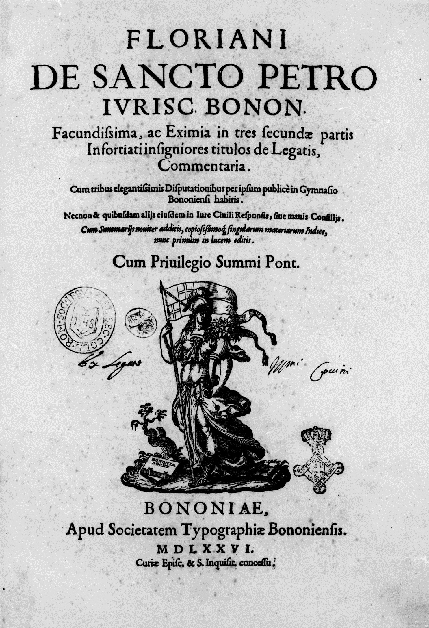 Frontespizio